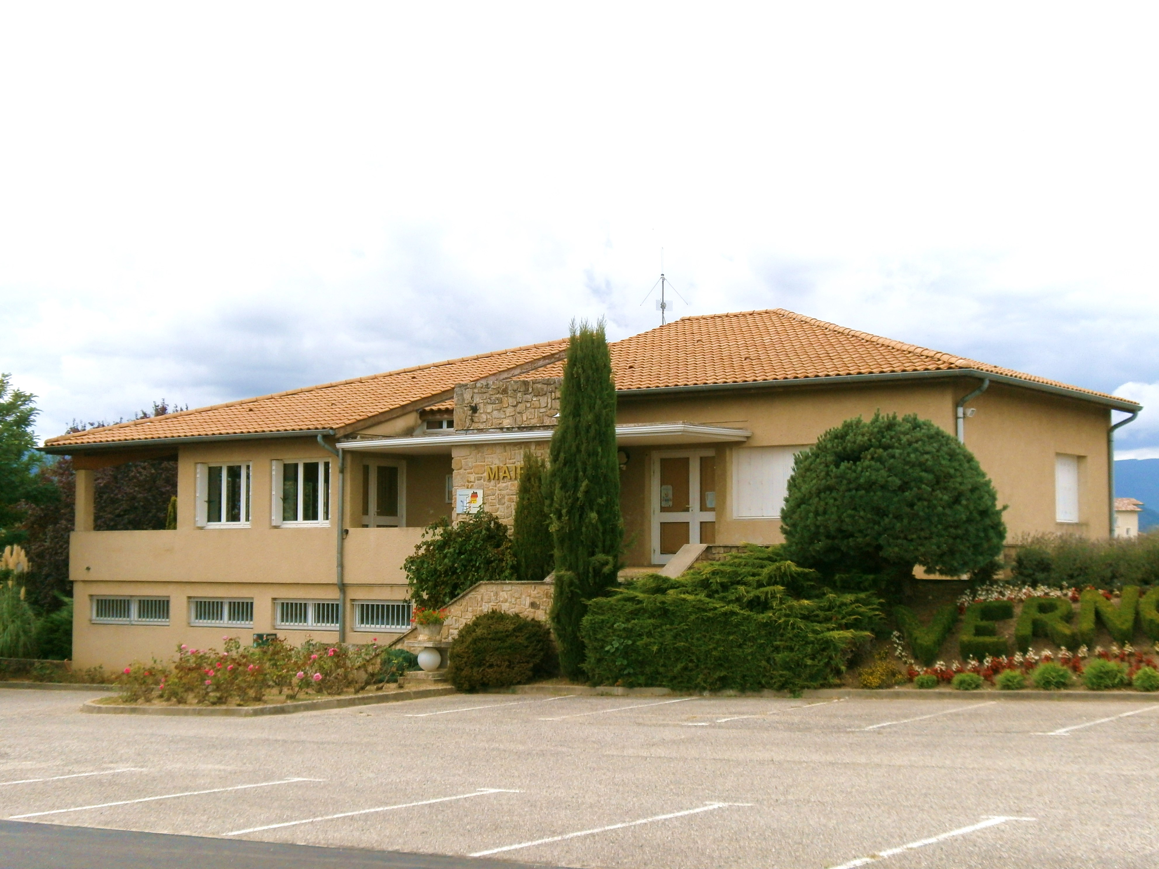 Vernosc-lès-Annonay, la mairie